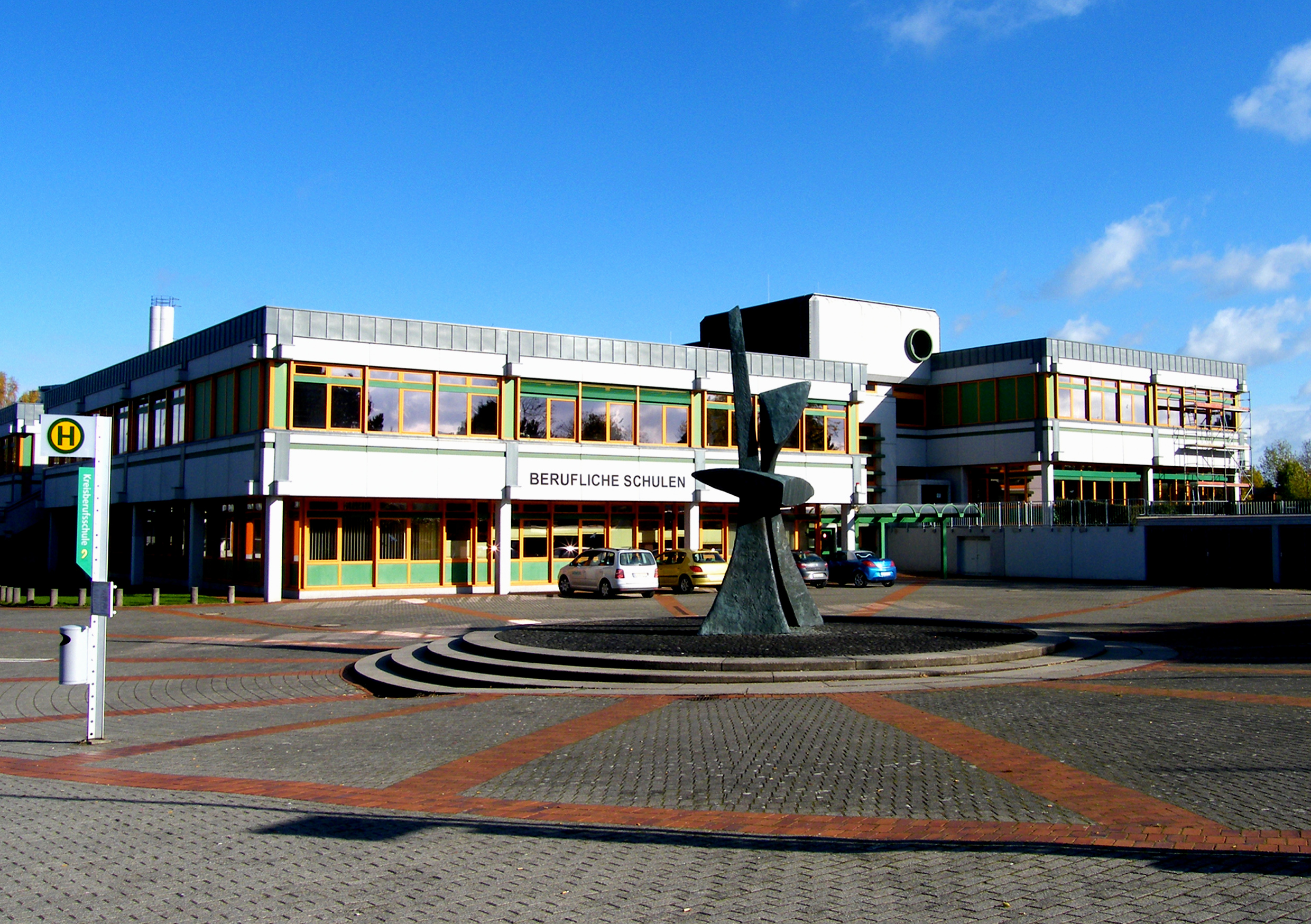 Kreisberufsschule Waldeck-Frankenberg, 34497 Korbach, Kasseler Straße